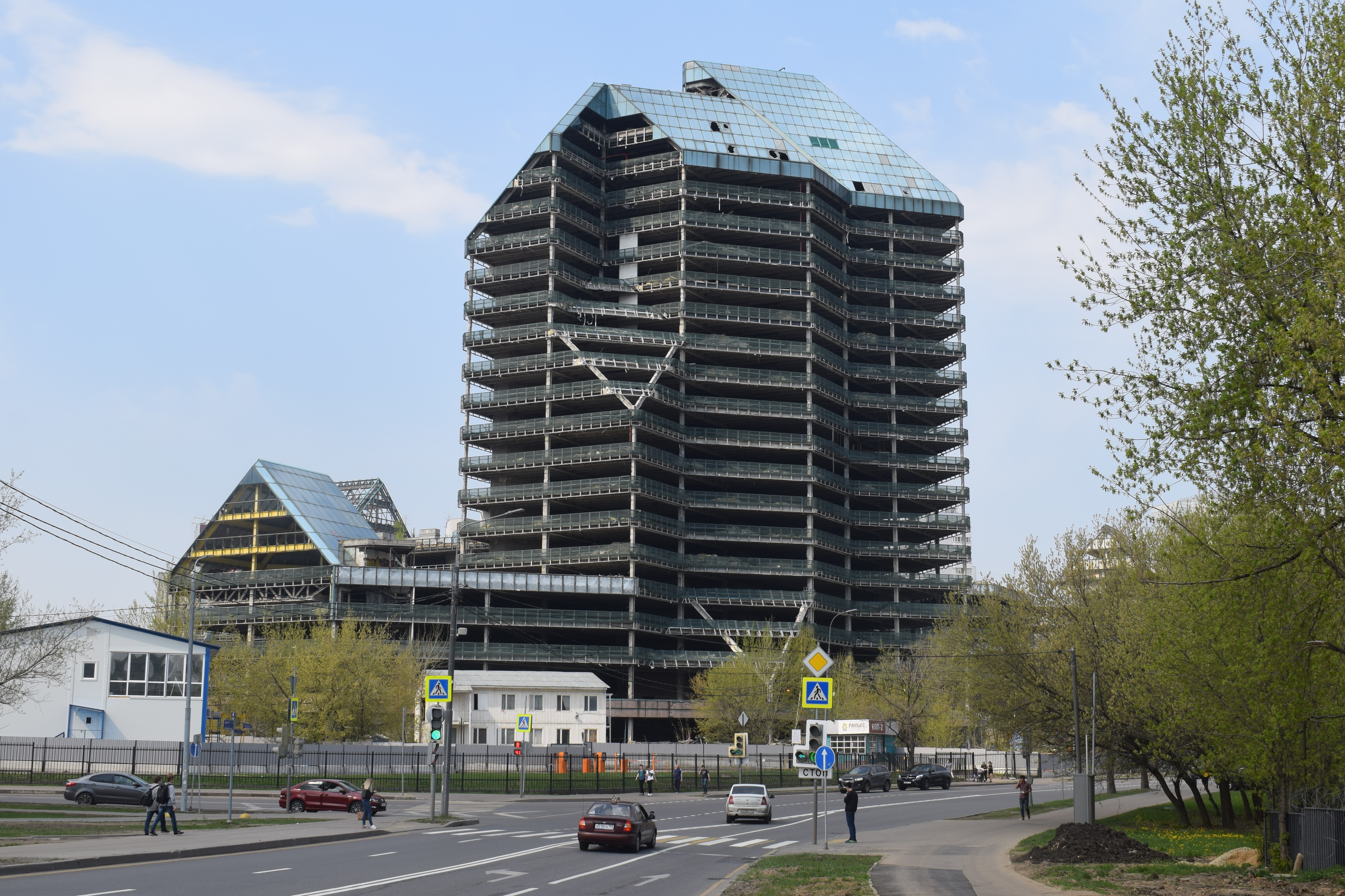 Деловой центр «Зенит» в конце апреля 2019 года.